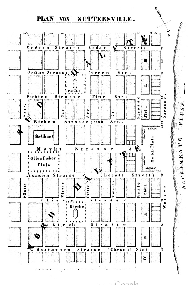 Grundriss der geplanten Stadt Sutterville (in der Stadt Sacramento aufgegangen)